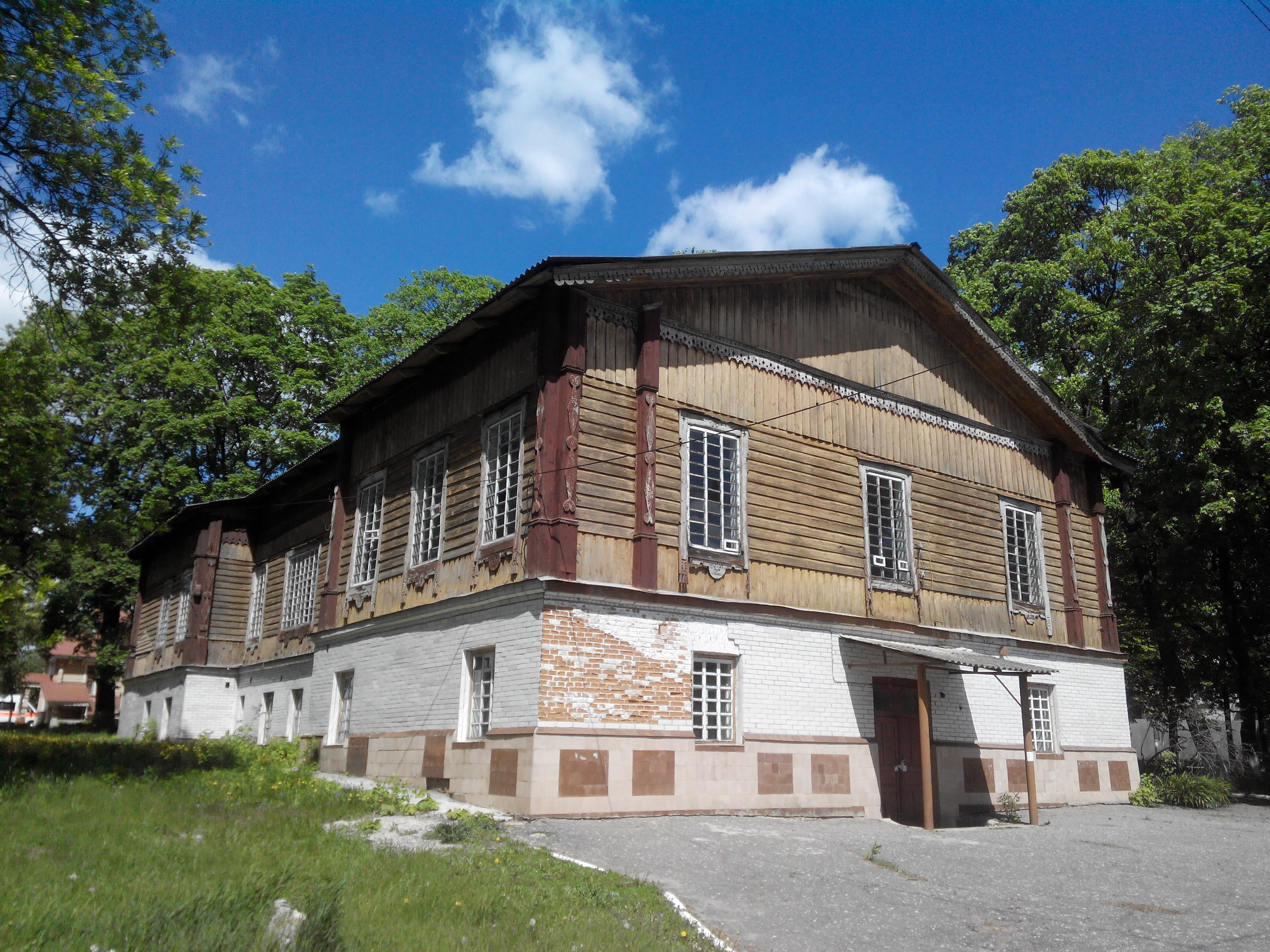 Корпус чоловічий, Глухів, вул. Інститутська, 3